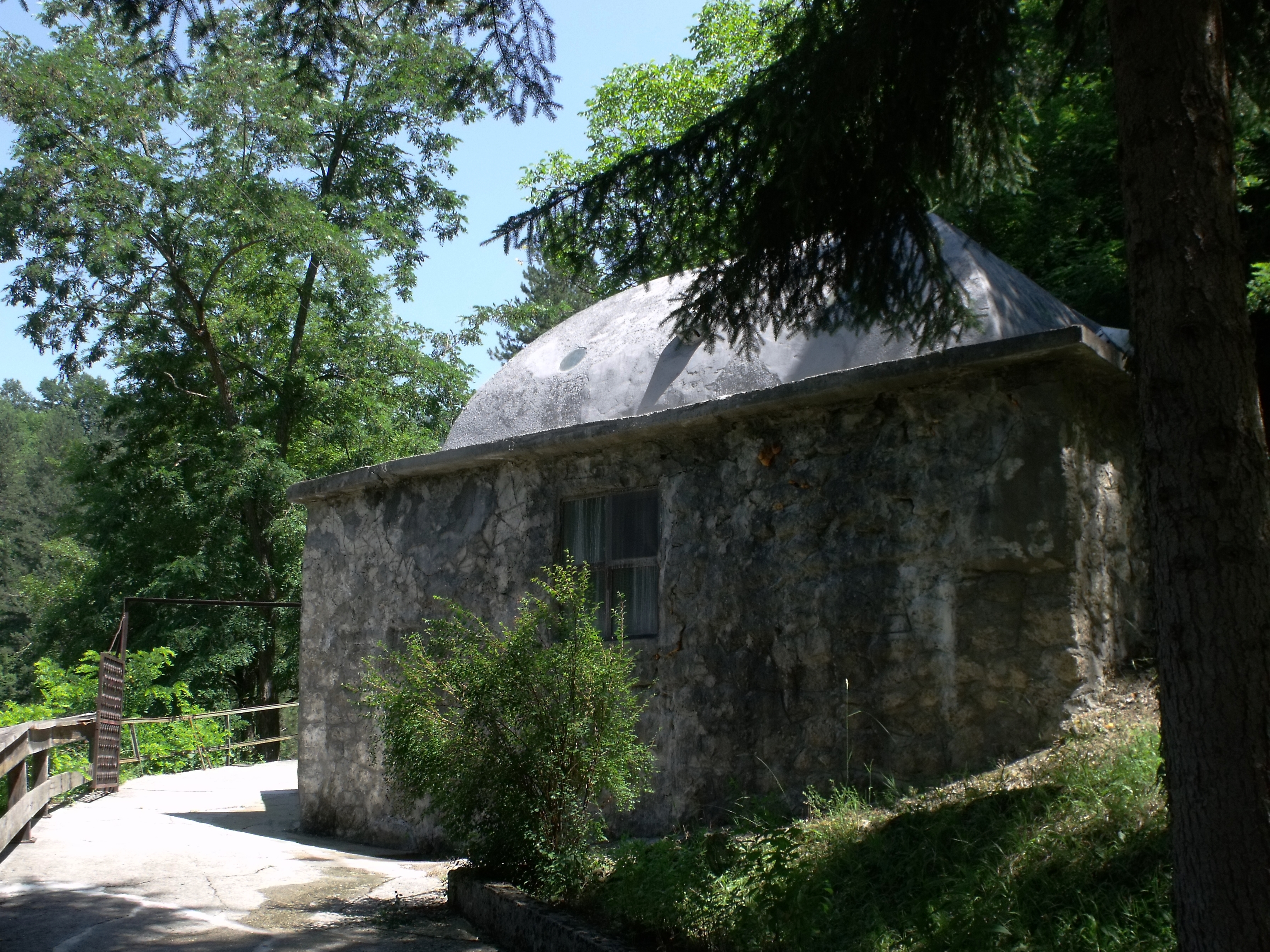 Banja Mehmed-paše Sokolovića u Višegradu Сликава е подигната во рамките на проектот „По трагата на душата 2015“.